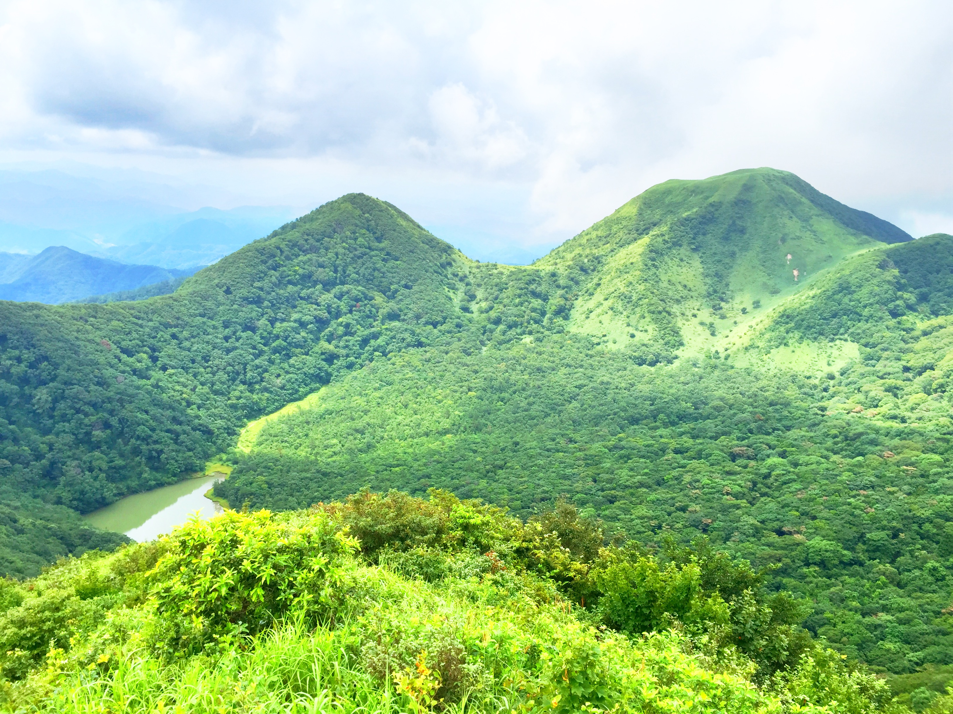 島根県の女三瓶山から望む子三瓶山(右）と孫三瓶山（左）。左下に火口湖の室の内池が見える。